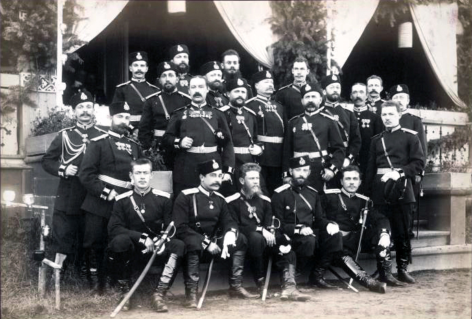 Description ТопографыDate до 1917 нрлаSource Unknown author Топографы